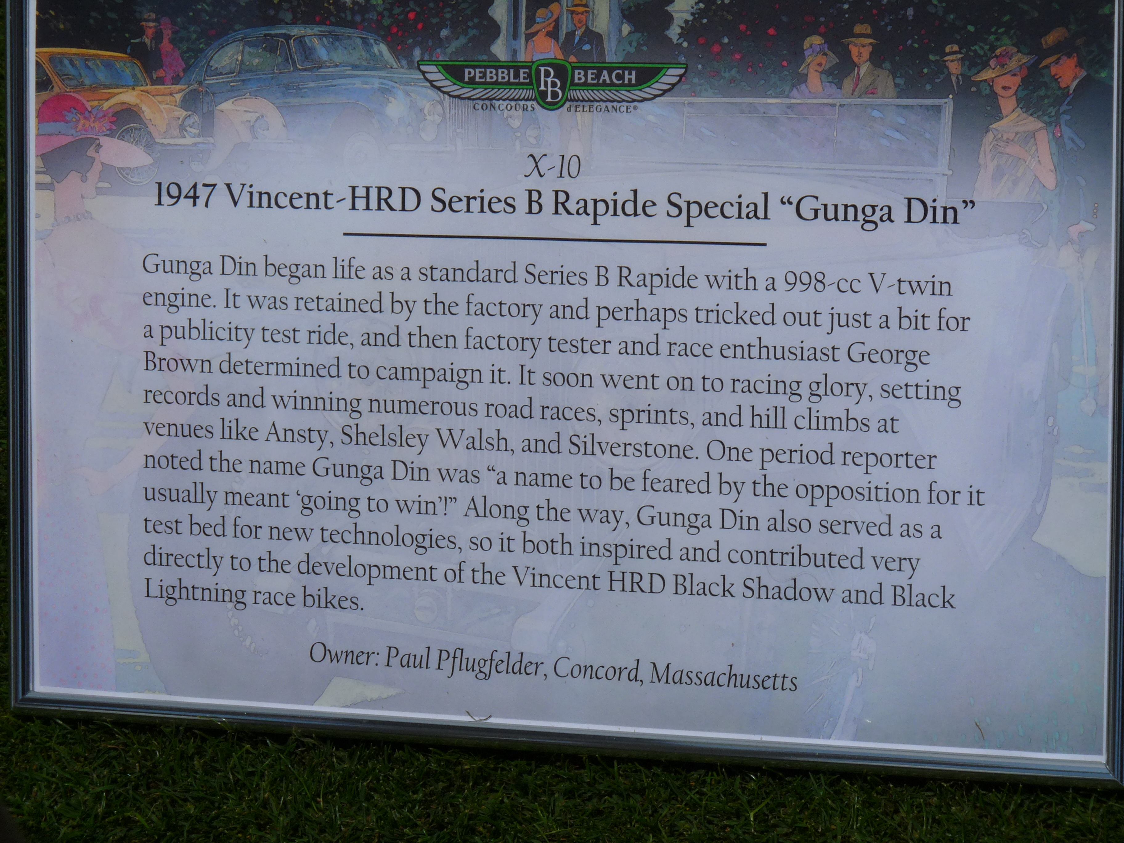 1947 Vincent Series B Rapide Special "Gunga Din"